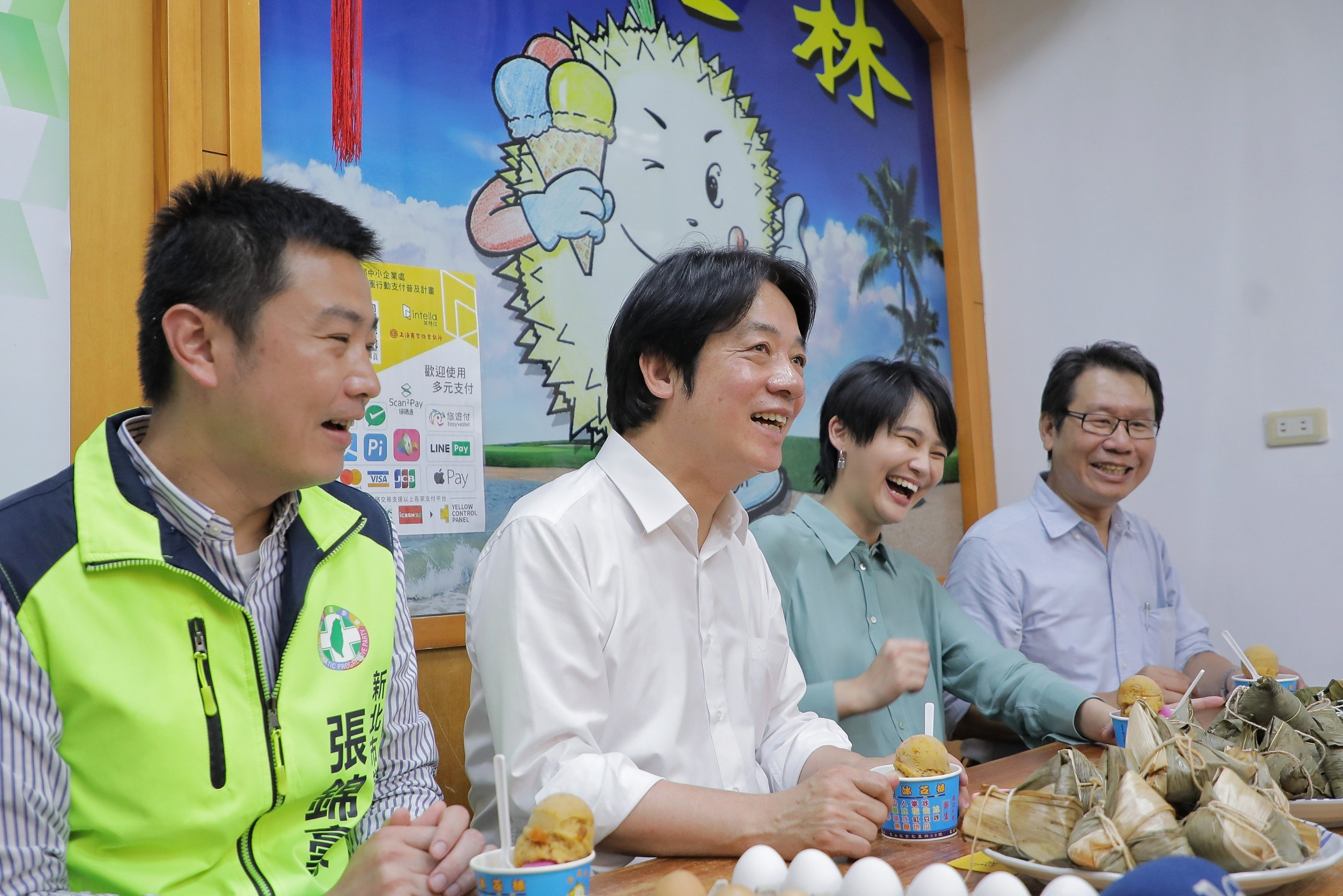 中文（台灣）: 中華民國副總統賴清德、民主進步黨新北市議員張錦豪、民主進步黨立法委員賴品妤、民主進步黨立法委員沈發惠參訪金山老街。